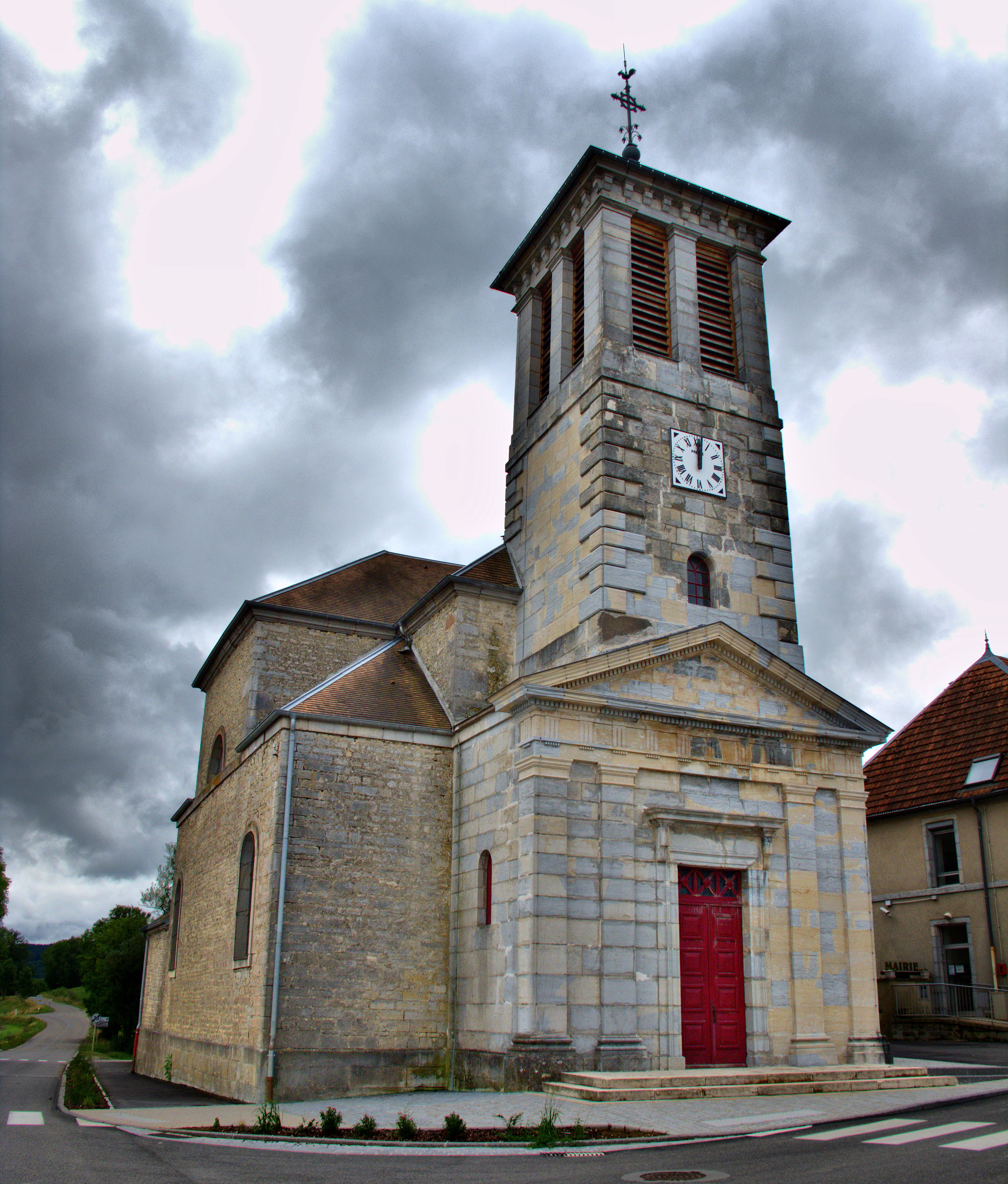 Inscrit aux monuments historiques sous le numéro PA00101671